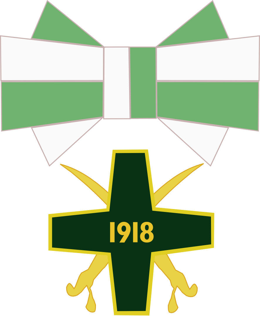 Орден "Освобождение Сибири", вариант награды за воинские заслуги.